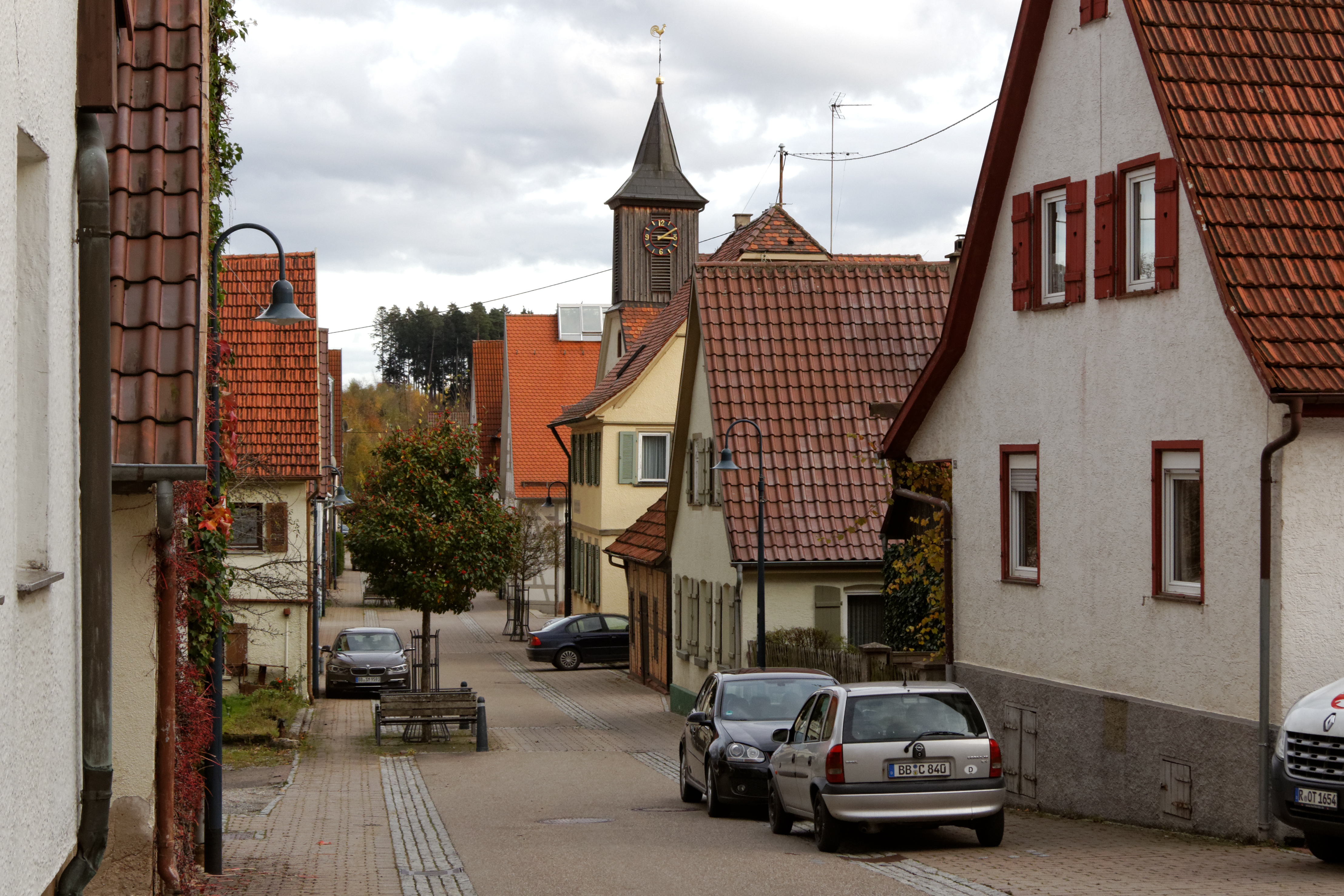 Hauptstraße mit Kirche in Perouse, einem Stadtteil von Rutesheim (Baden-Württemberg).